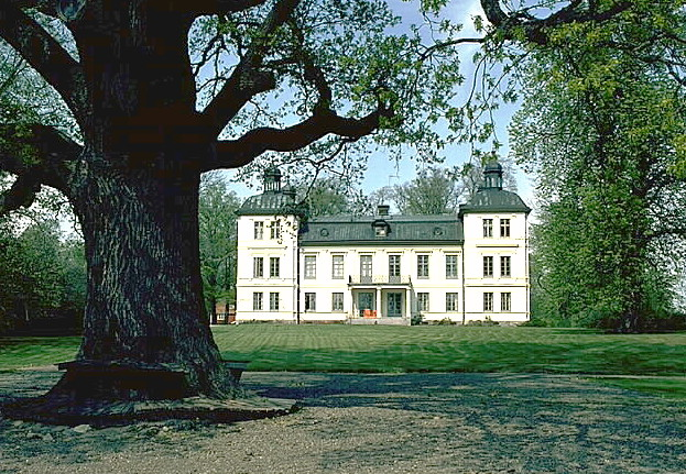 Bilden troligen från slutet av 1970-talet. Motiv: Skenäs Kategori: Herrgård, Herrgårds-/slottslandskapBilden troligen från slutet av 1970-talet.